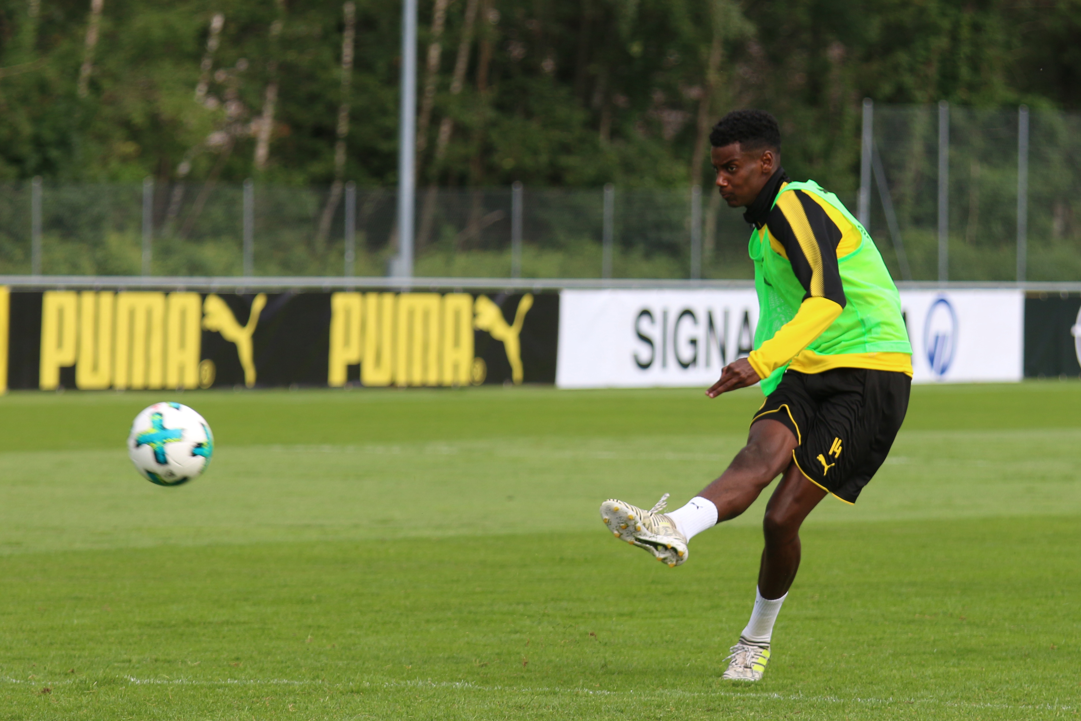 Alexander Isak im BVB Trainingslager in Bad Ragaz 2017